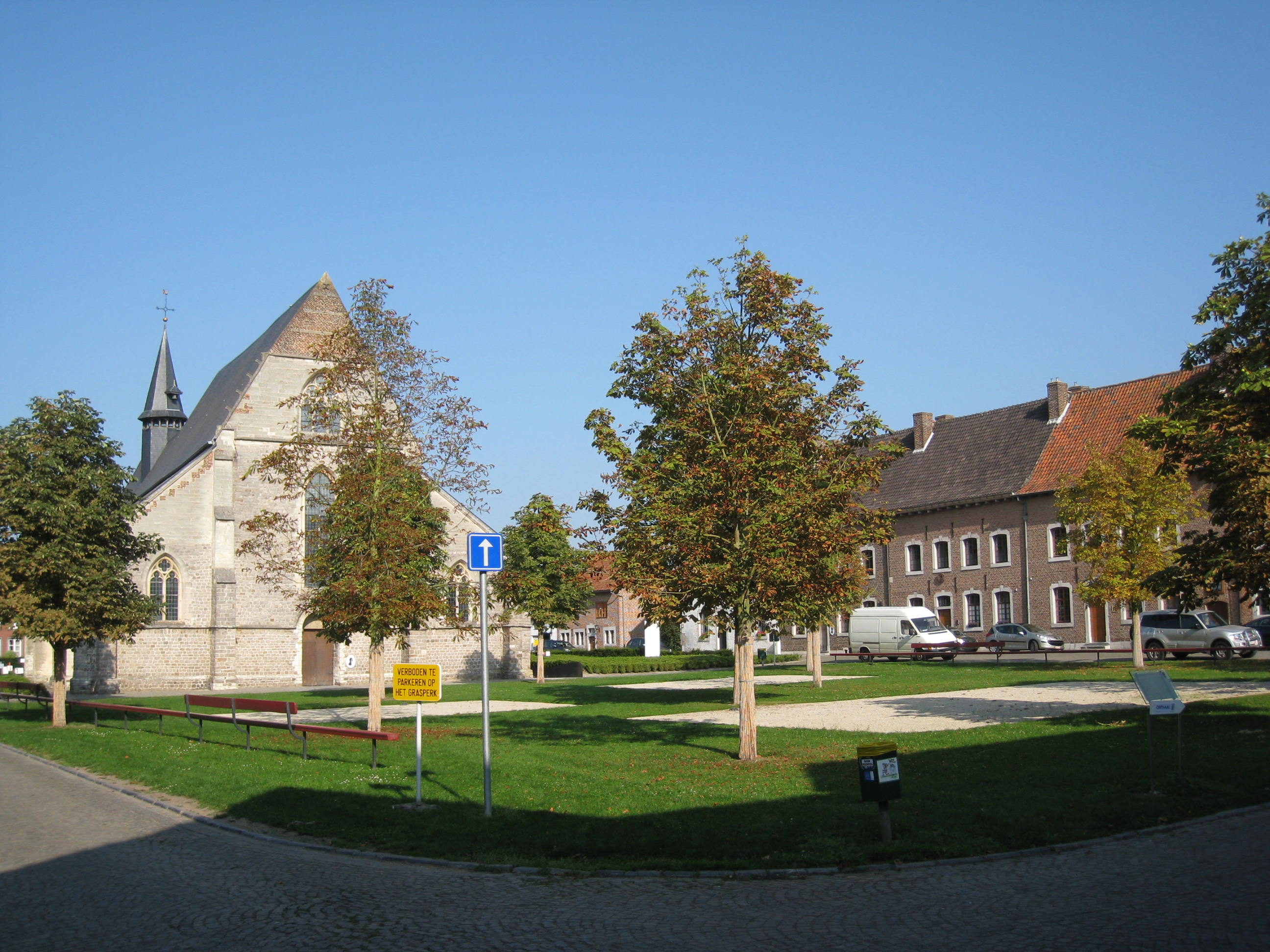 Begijnhofkerk met bleekweide, Sint-Agnes begijnhof, Sint-Truiden